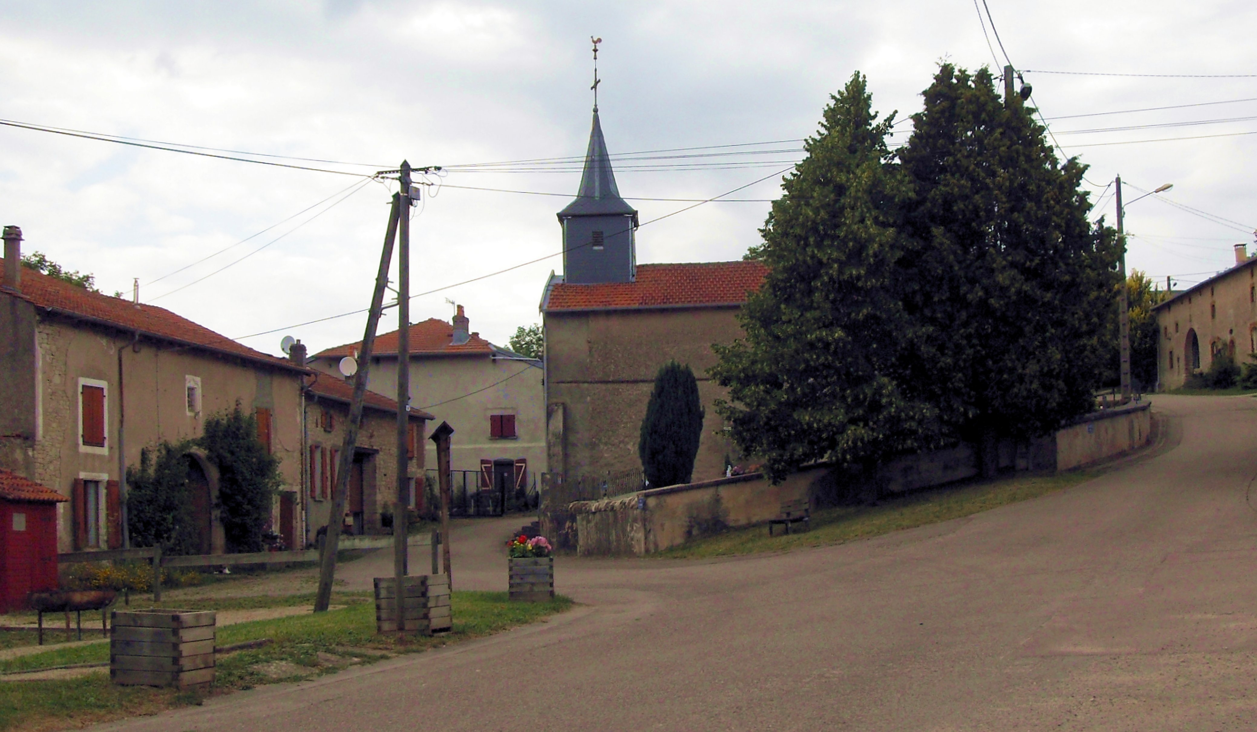 L'église Notre-Dame d'Avrainville